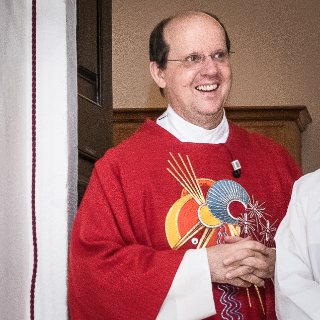 Johannes Siebner, Pfingsten 2019 in Sankt Blasien